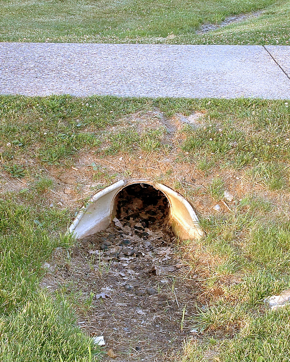 Alcantarilla bajo una senda peatonal. A small culvert under a sidewalk. Photograph taken May 28, 2005 at a rest stop in Missouri by Kelly Martin.